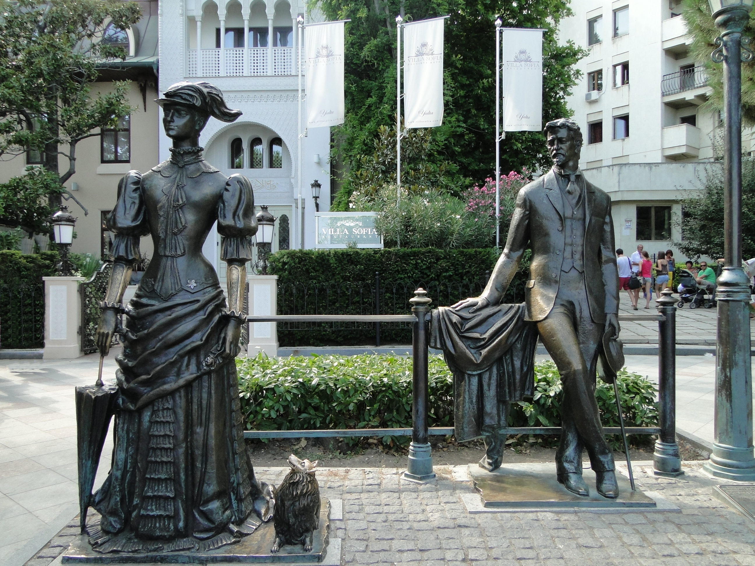 Памятник Антону Павловичу Чехову и Даме с собачкой на набережной Ялты